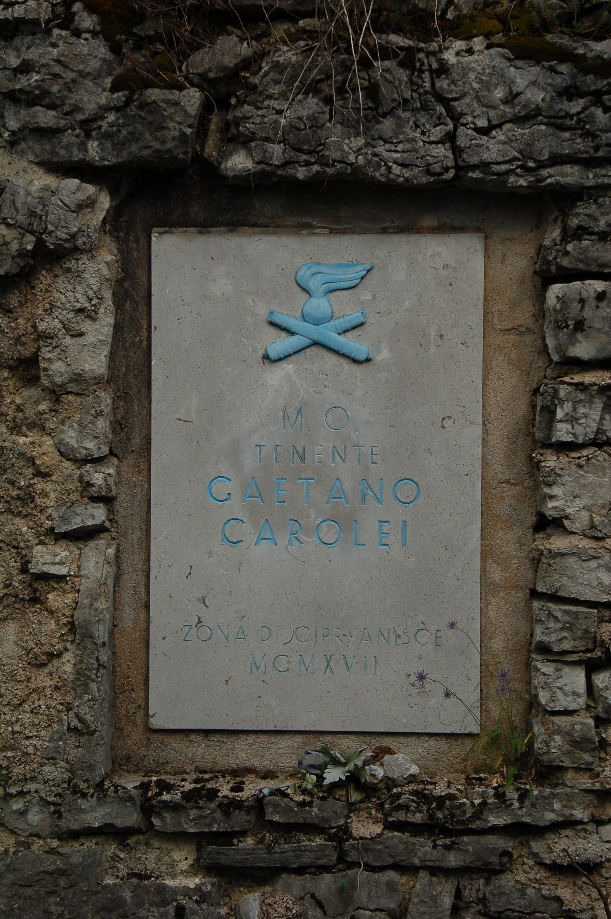 Lapide situata sulla Strada degli Artiglieri a Rovereto